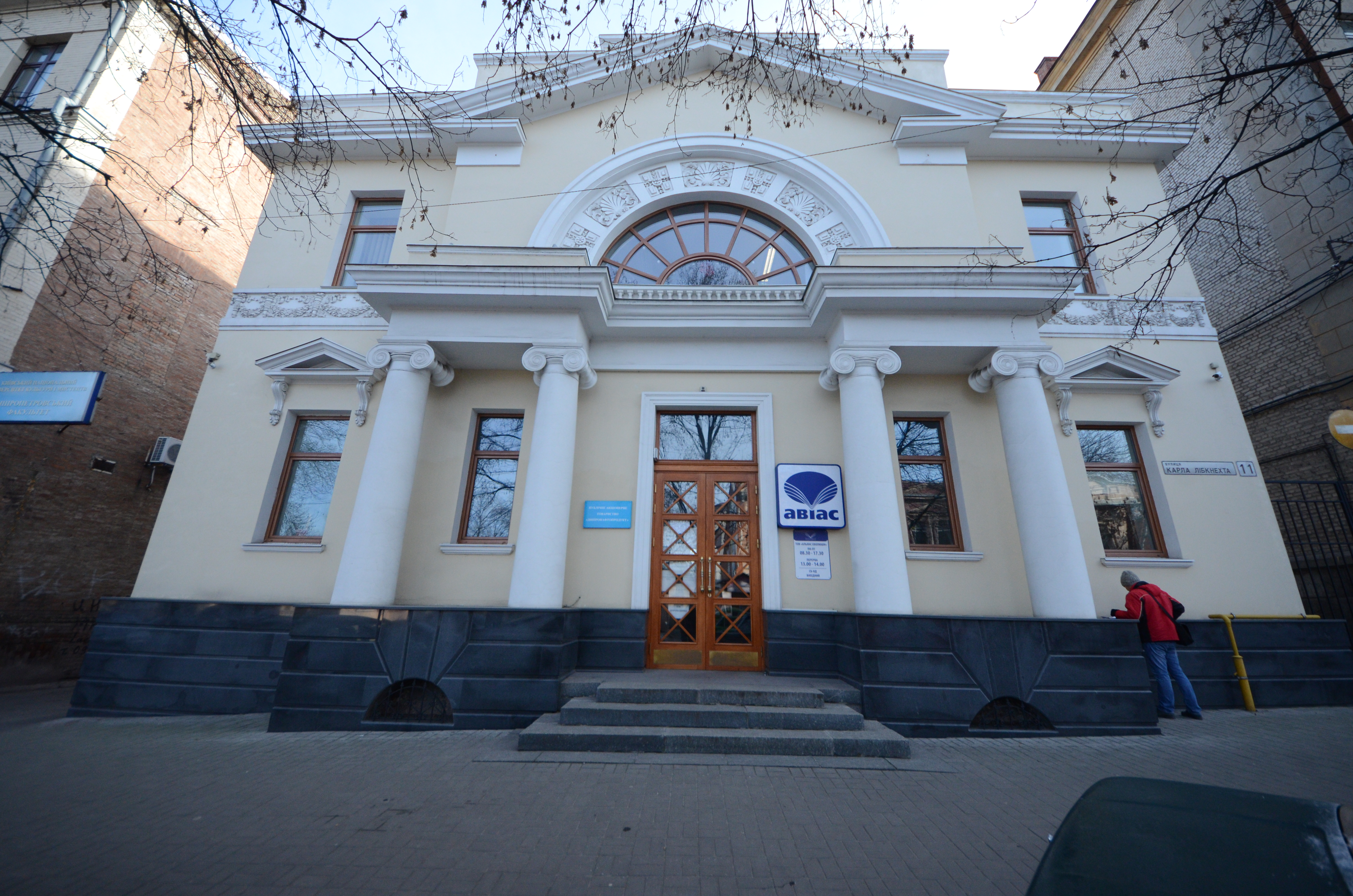 Пансіонат-притулок для дітей загиблих офіцерів, Дніпро, вул. М. Грушевського (К. Лібкнехта), 11